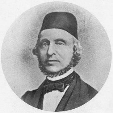 Jules Frederik Jürgensen; dänischer Uhr- und Chronometermacher (1808–1877)